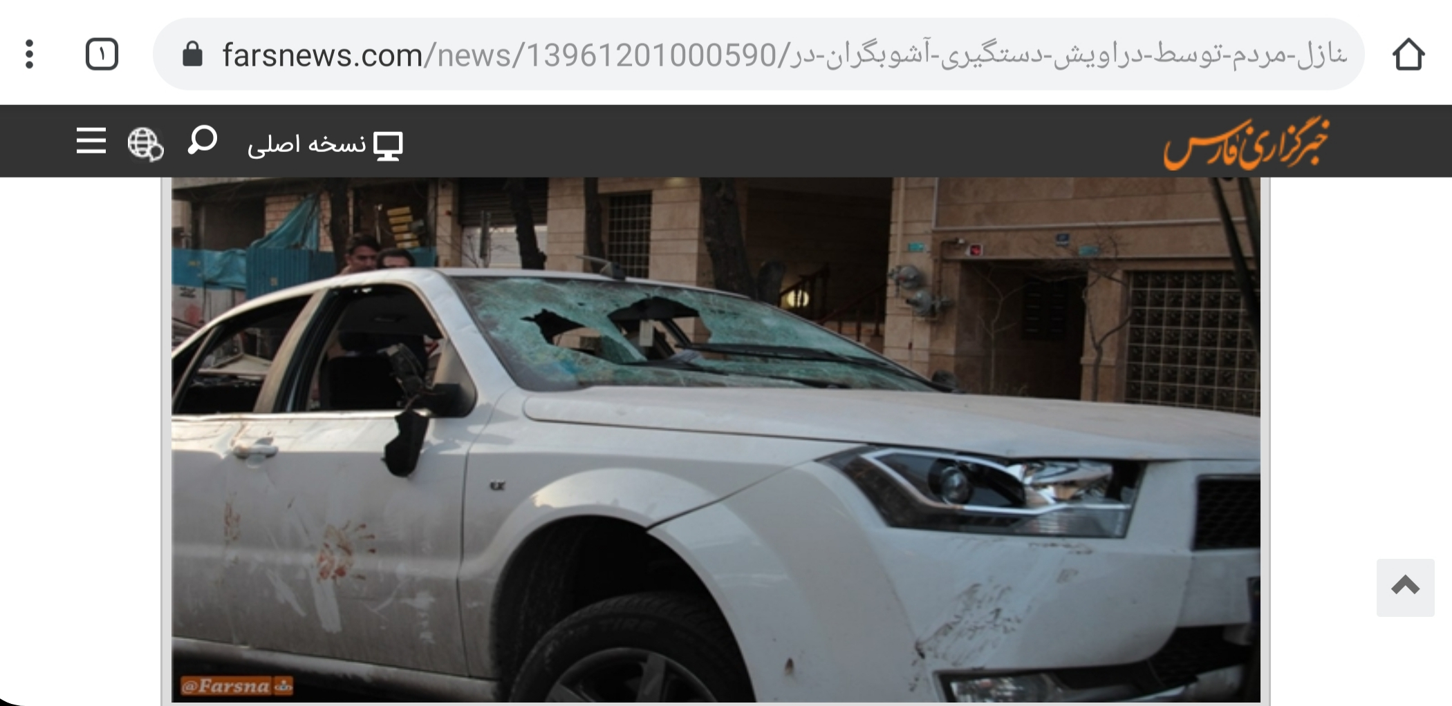 تصویر ماشین تخریب شده مصطفی عبدی درویش گنابادی در واقعه گلستان هفتم که در خبرگزاری فارس نیوز منتشر شد. یکم اسفند ۱۳۹۶